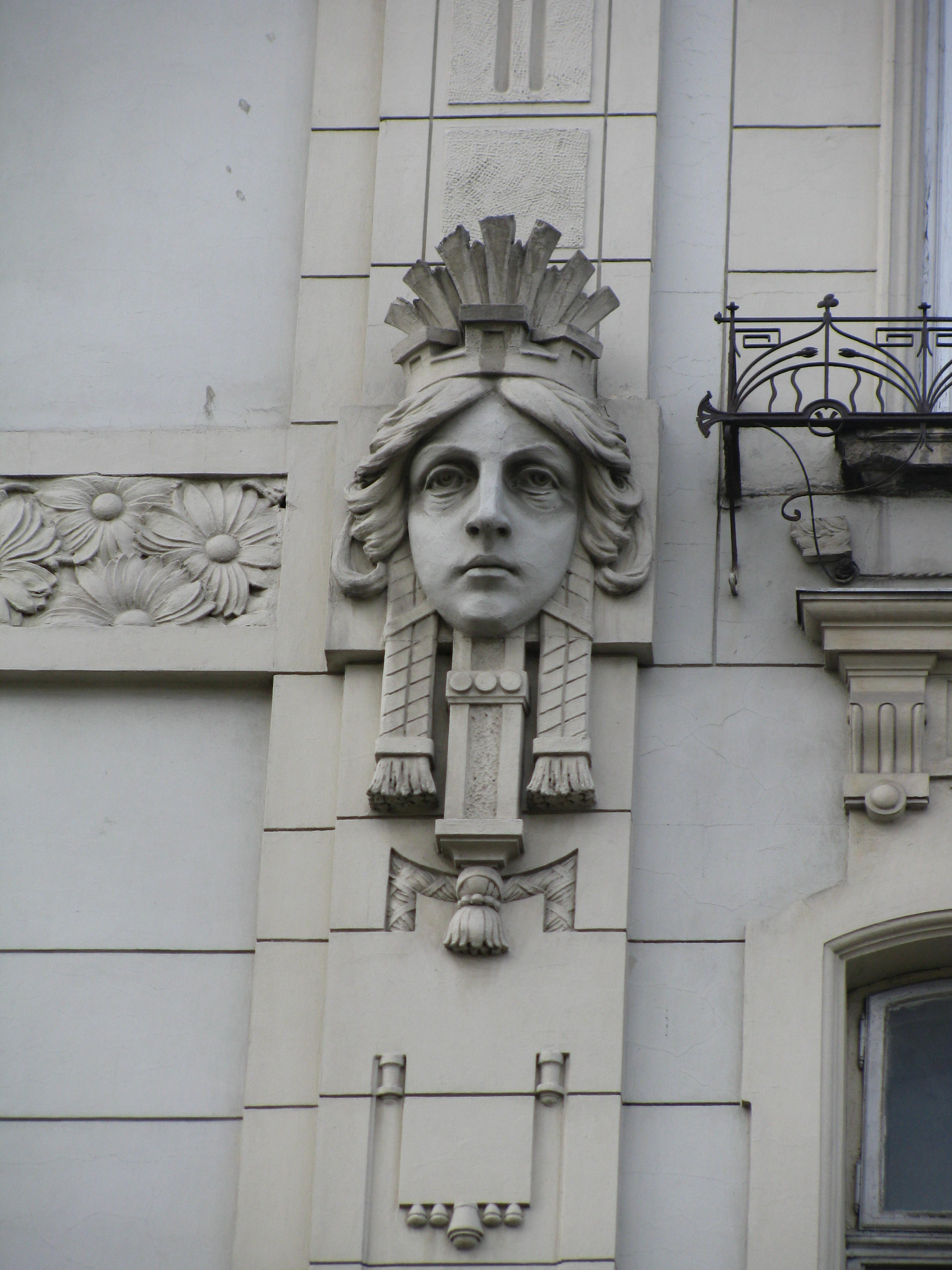 Сецесійний будинок №1 по вулиці Руданського у Львові. Збудований за проектом Юліуша Цибульського (1859—1924).